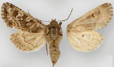 Psammopolia ochracea female